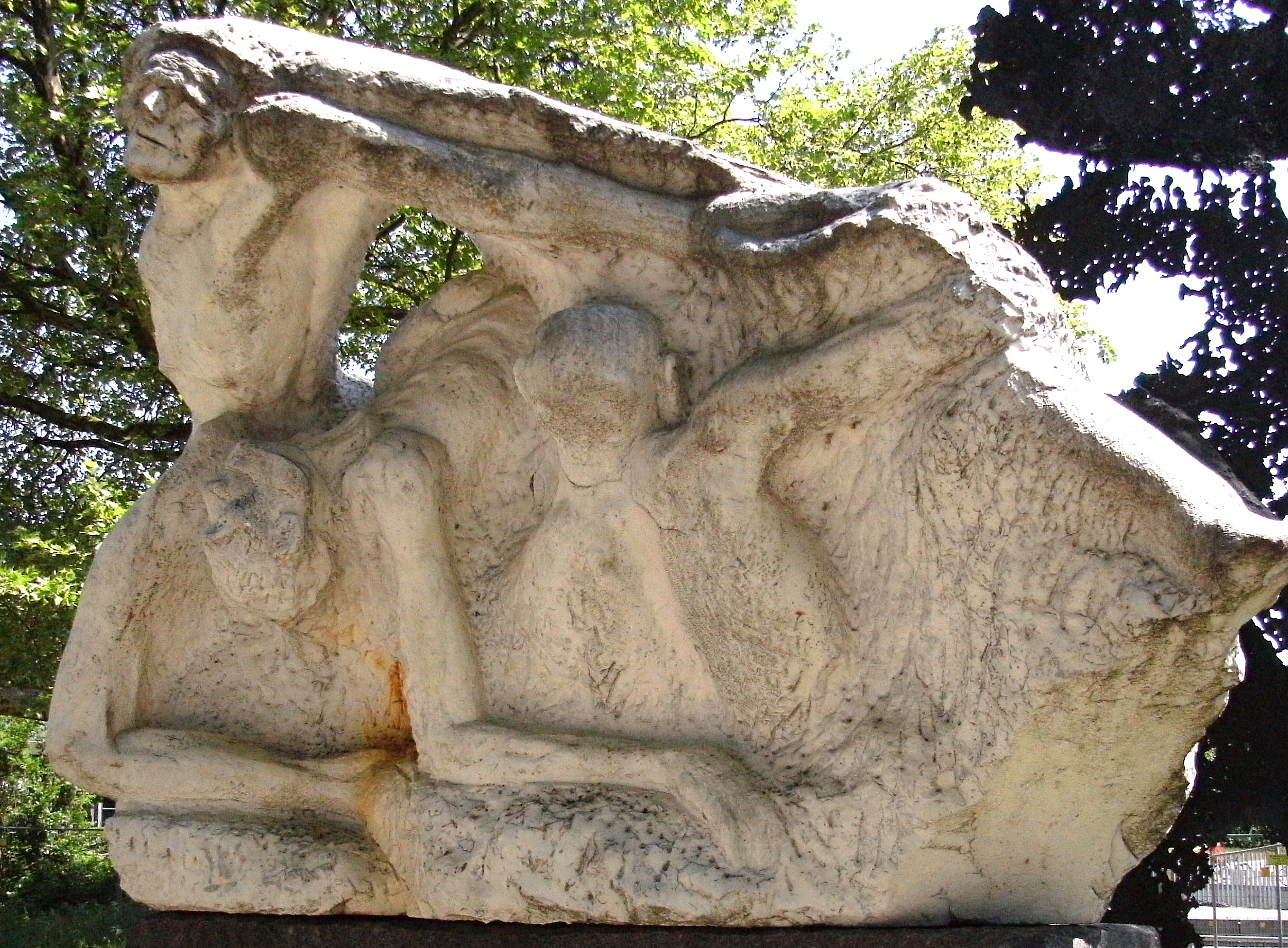 Detail des Mahnmals gegen den Krieg (1985/86) von Alfred Hrdlicka, ein Gegendenkmal zum 76er - Kriegerdenkmal (1936) von Richard Kuöhl am Dammtor in Hamburg